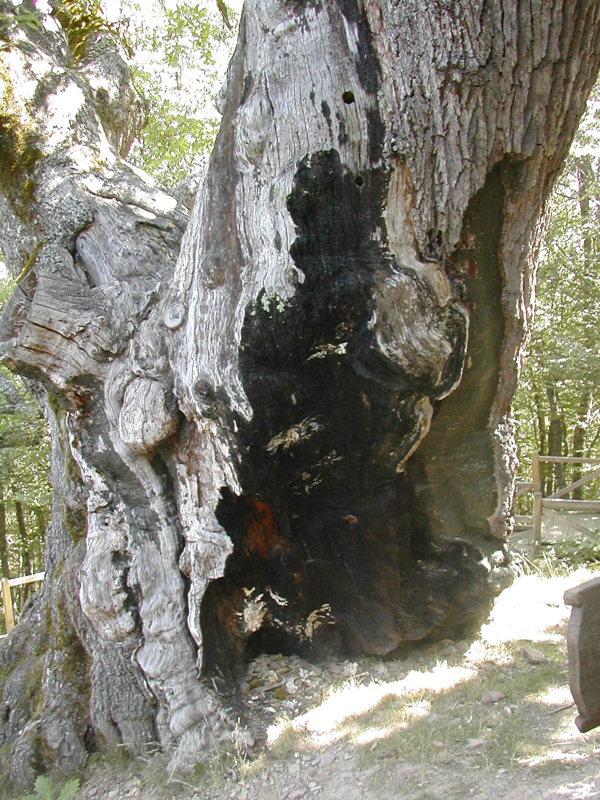 Roblon de Estalaya (Palencia) España